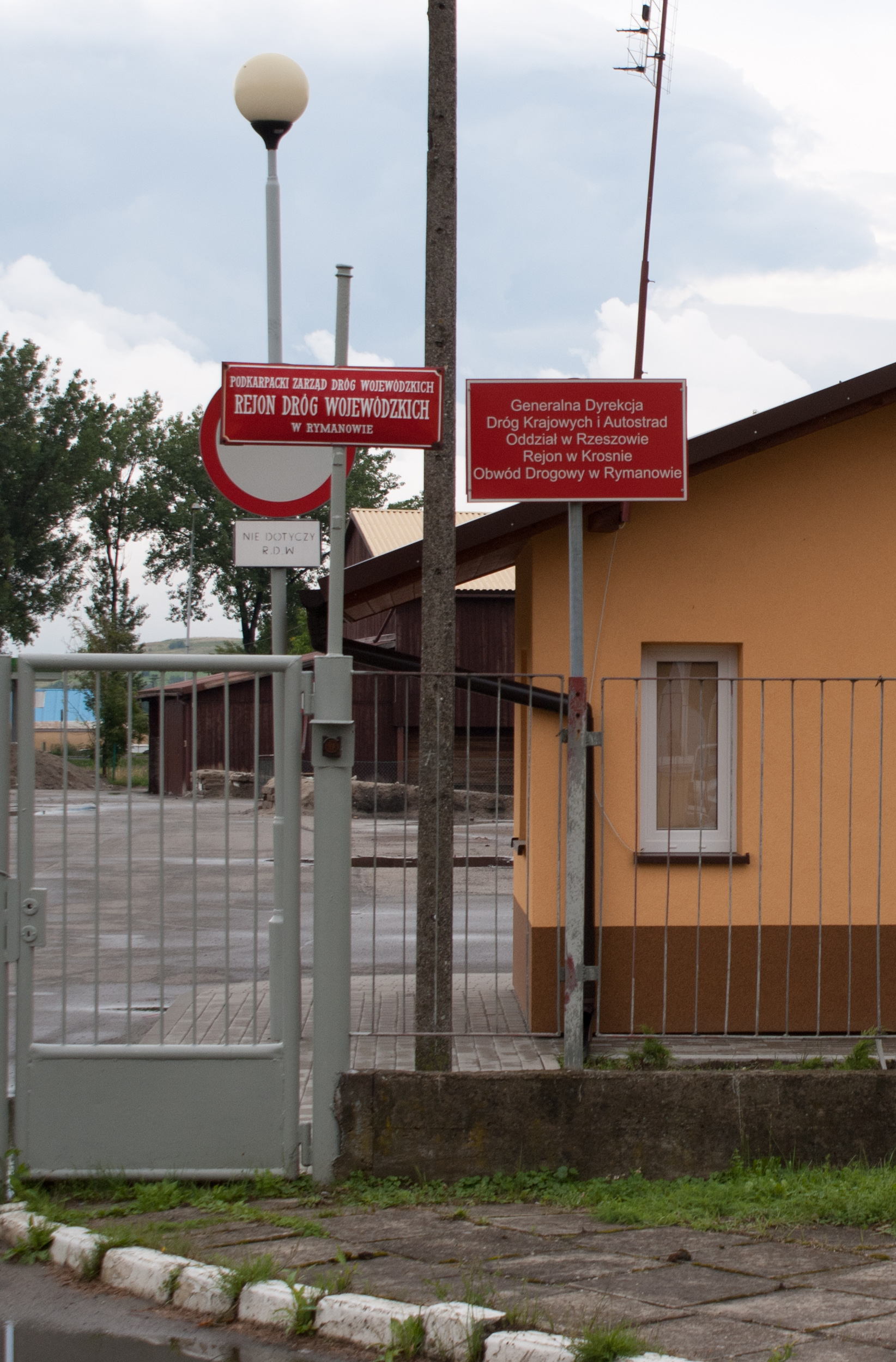 Podkarpacki Zarząd Dróg Wojewódzkich, Rejon Dróg Wojewódzkich w Rymanowie. Generalna Dyrekcja Dróg Krajowych i Autostrad, obwód drogowy w Rymanowie.